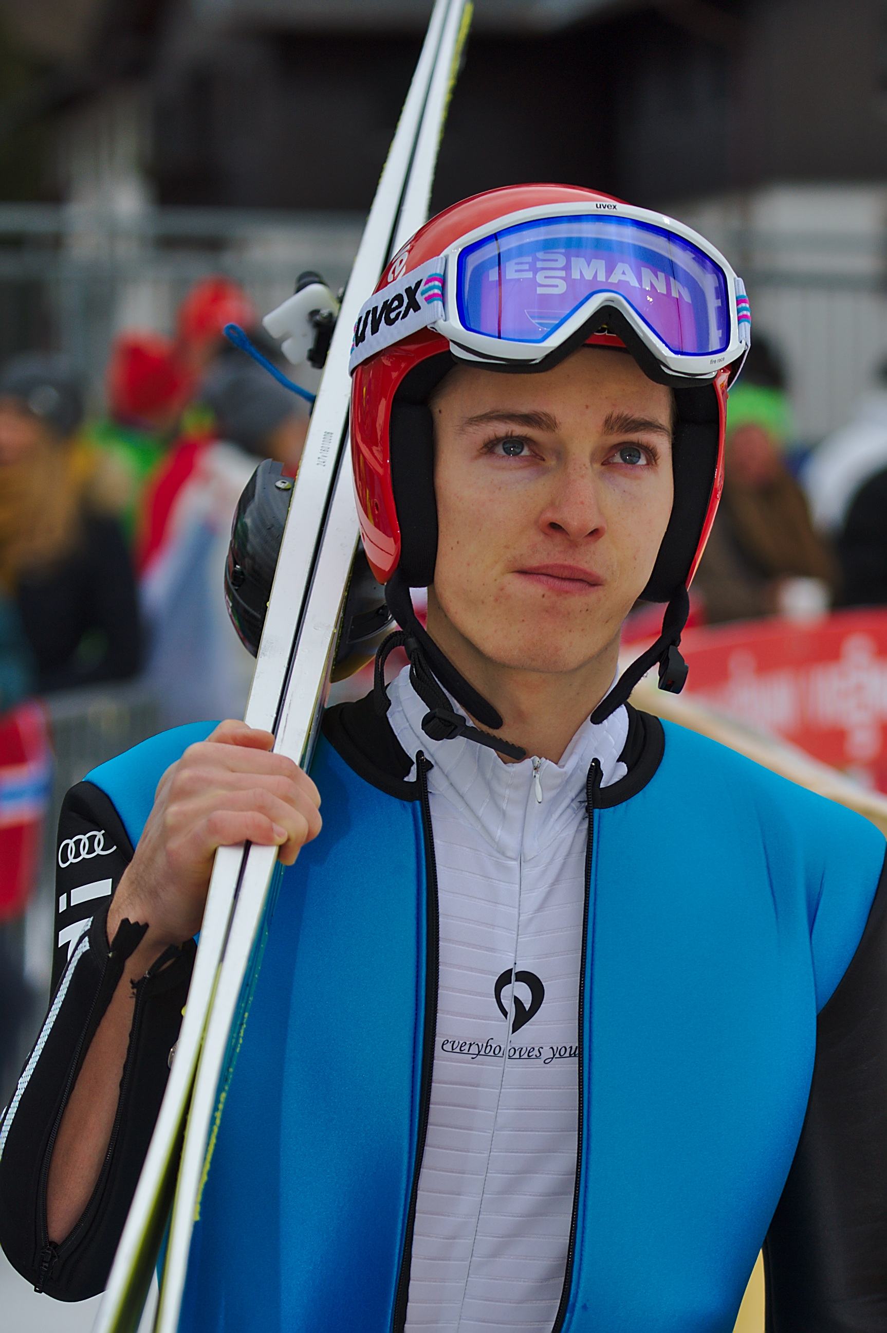 FIS Worldcup Nordic Combined Ramsau 2016. Bild zeigt Manuel Faißt (GER)